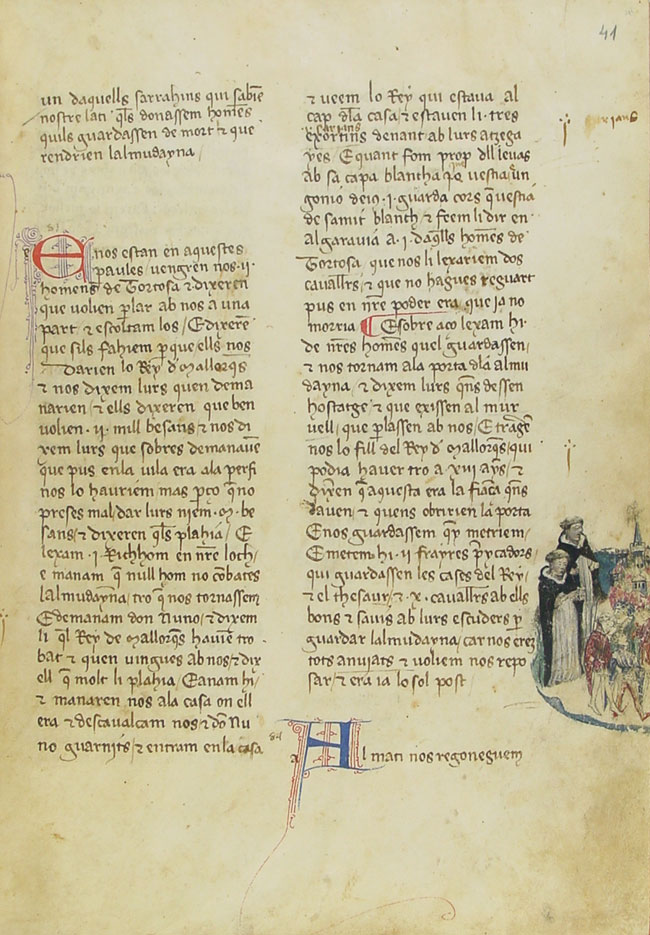 Libre dels Feyts